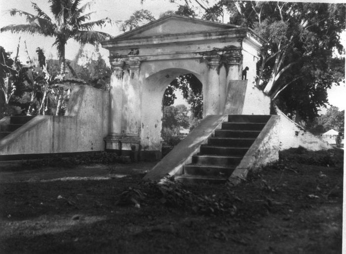 Foto. De poort van het gesloopte Fort Utrecht in de omgeving van Banjoewangi op Oost-Java